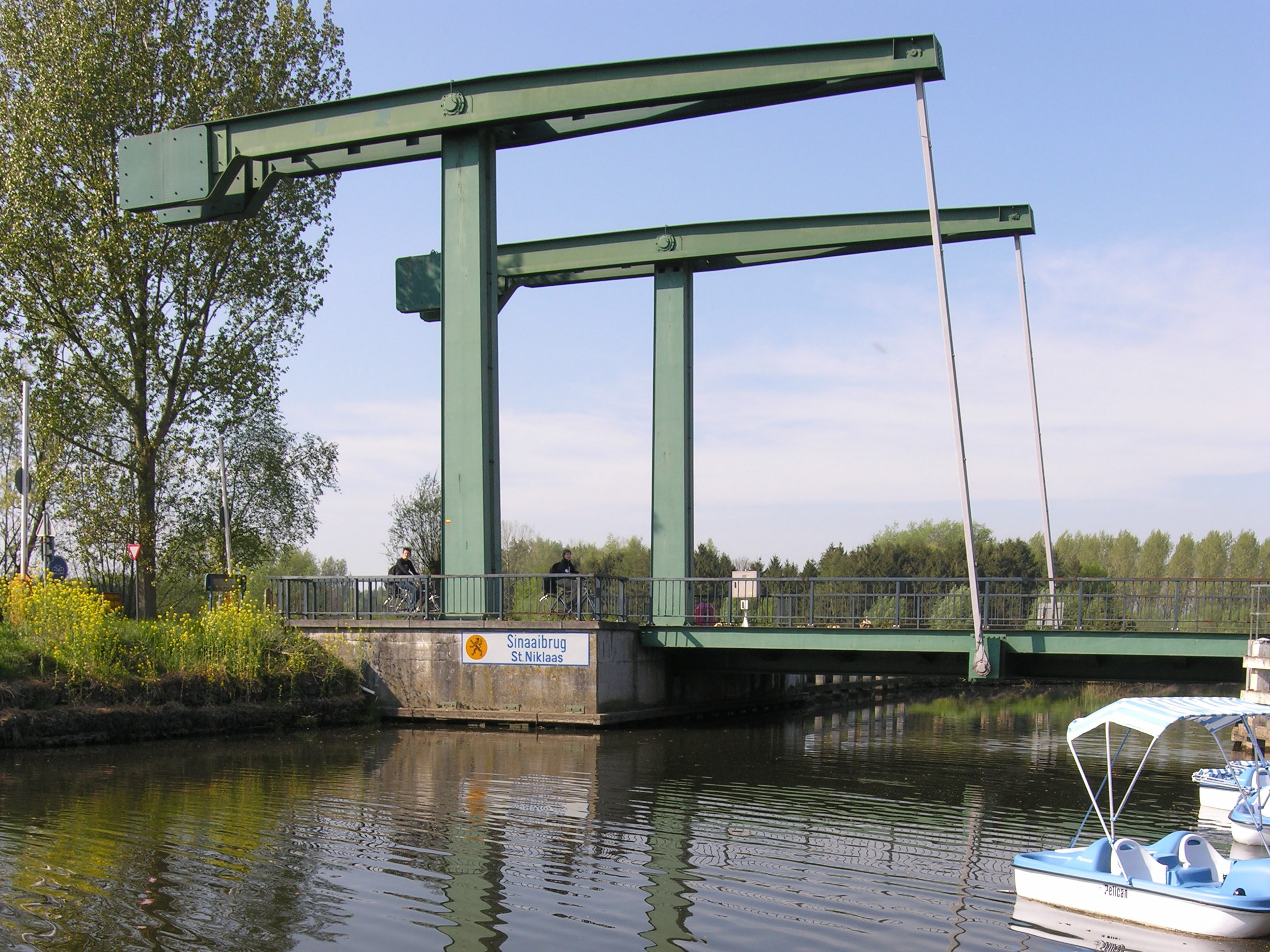 Sinaai bridge, Moervaart, near Sint-Niklaas, Belgium